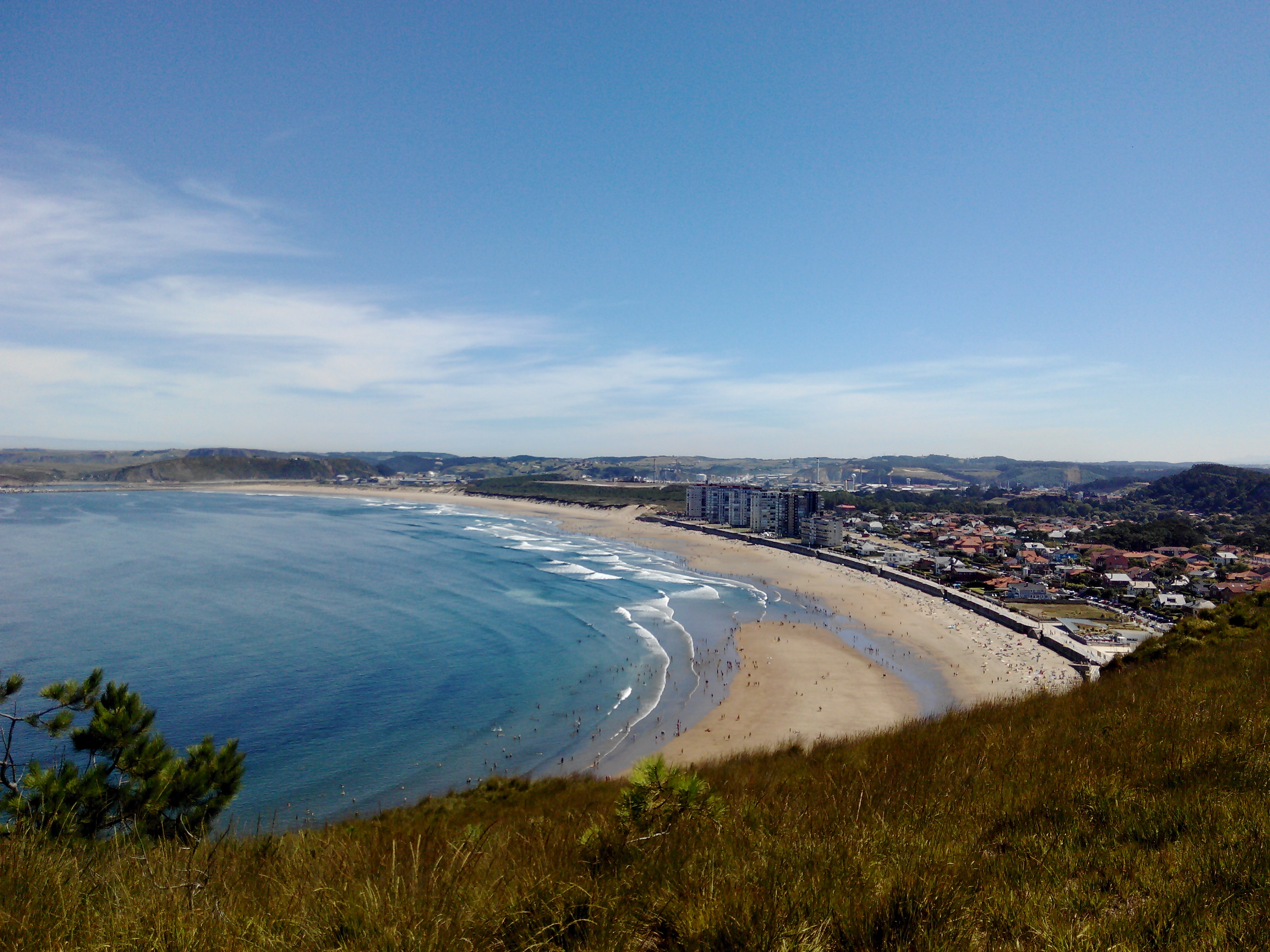 Playa de Salinas desde Pinos Altos This is a photography of a Special Area of Conservation in Spain with the ID: ES1200055. Natura2000 entry, EEA entry